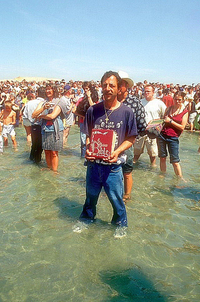 Pèlerin portant la Bible lors du bain rituel dans la mer aux Saintes-Maries